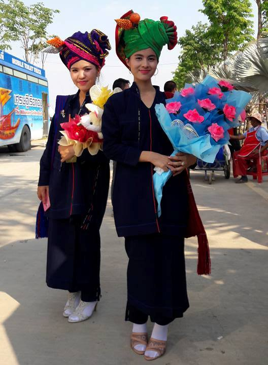 မြန်မာဘာသာ: ခွန်စိုးဇော်သူ